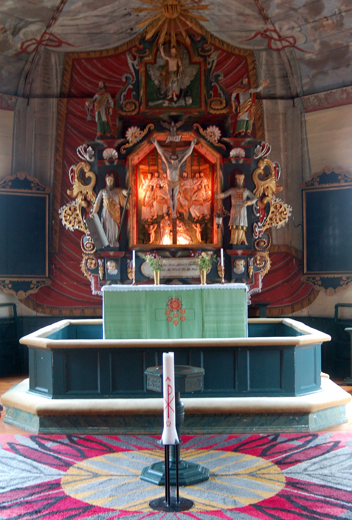 Altaruppsatsen i Nysunds kyrka, Åtorp Sweden. Altaruppsatsen tillverkades av Bengt Svensson 1694. Den berättar om Jesu liv. Isak Schullström målade och kompletterade altaruppsatsen på 1750-talet.